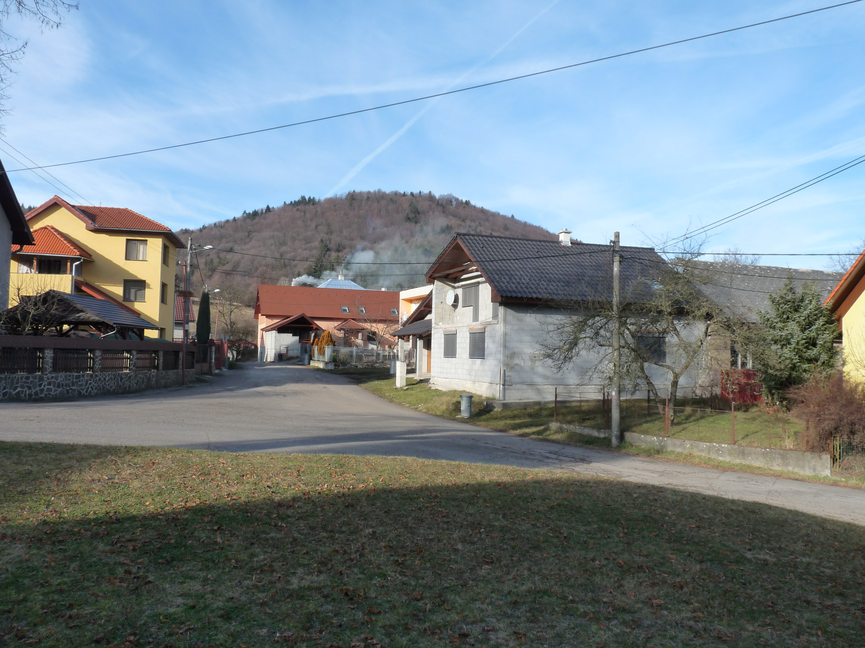 Repište